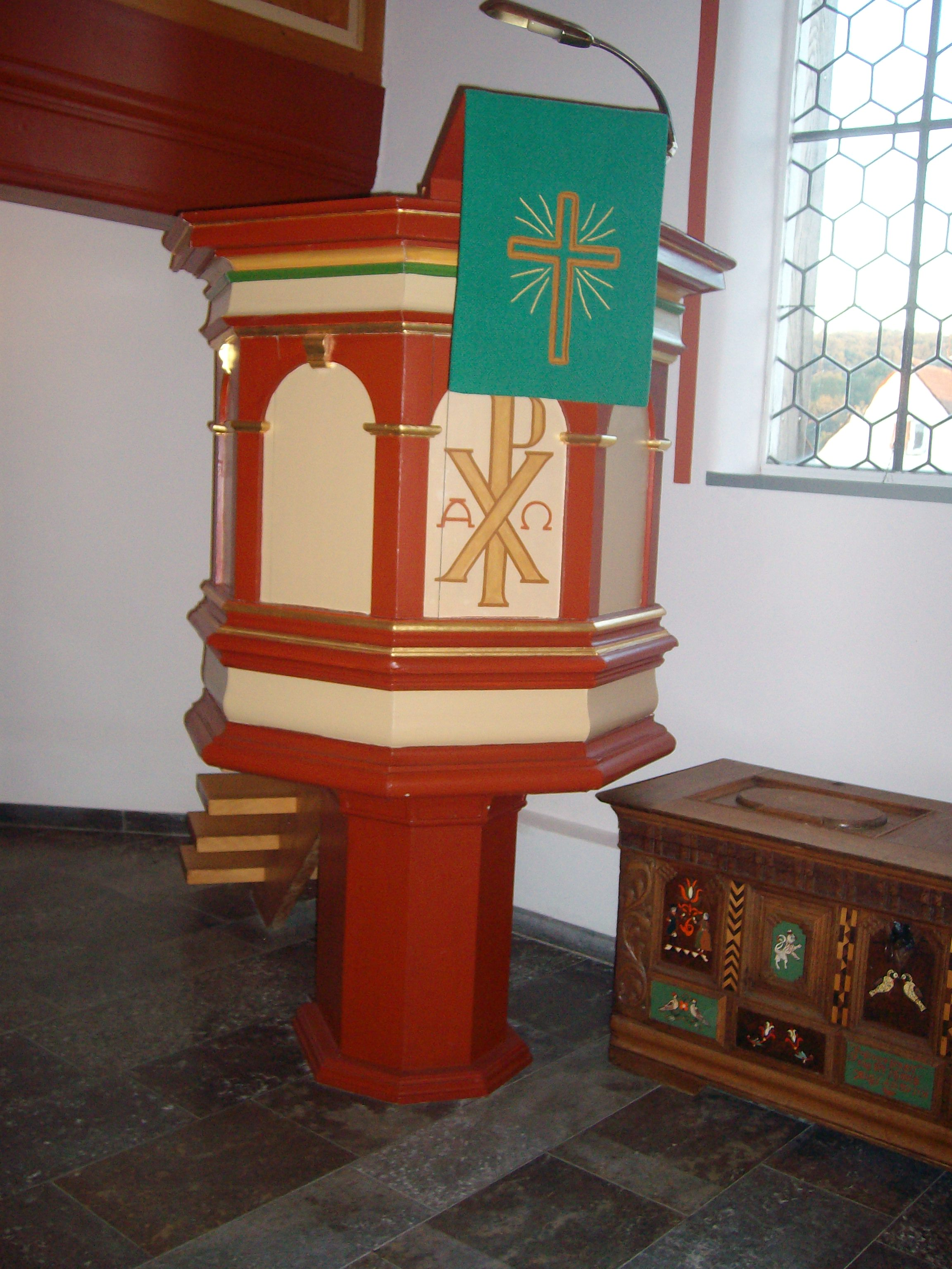 Kanzel der Evangelischen Kirche Lauter, Laubach, Landkreis Gießen, Hessen, Deutschland